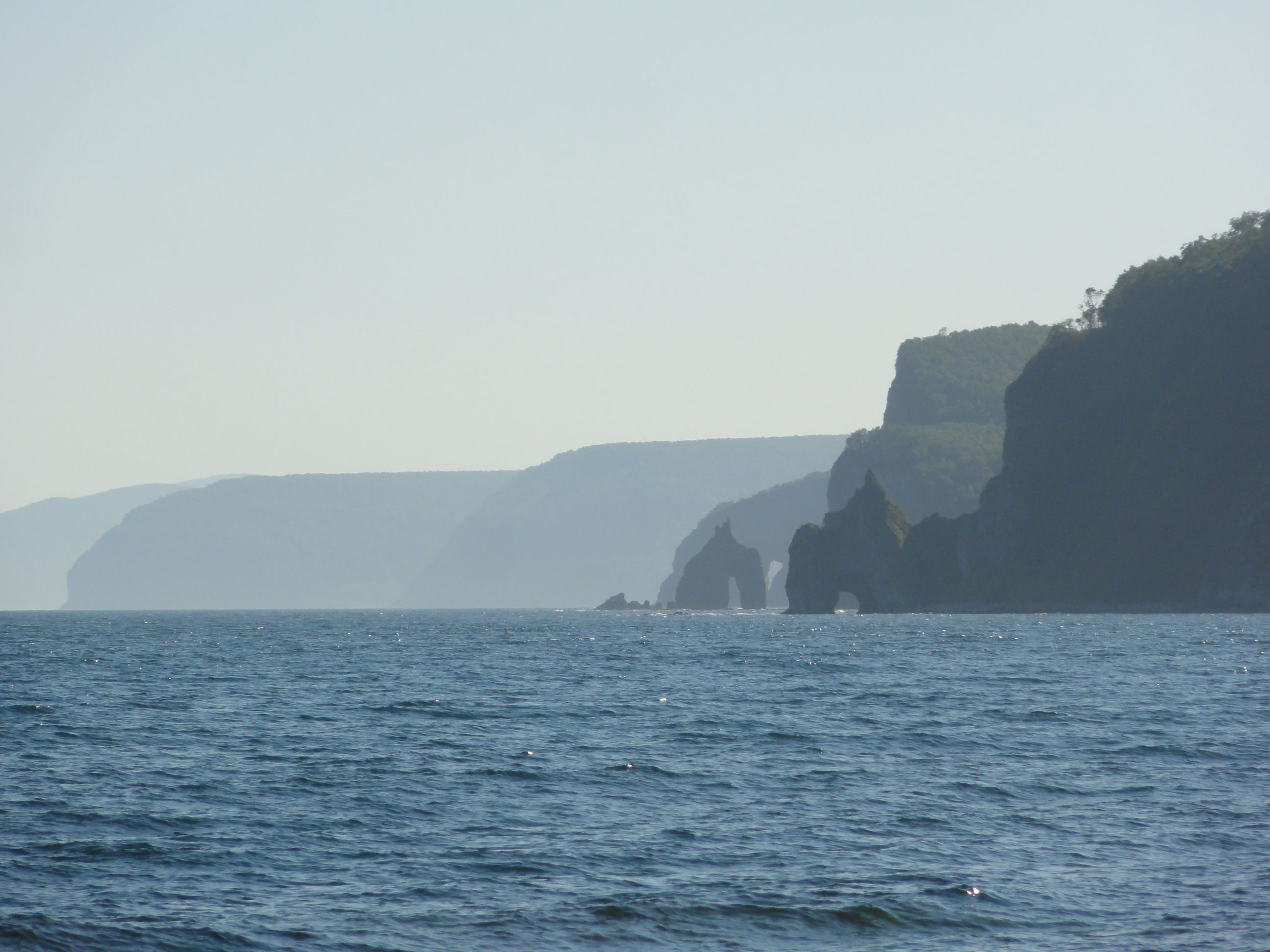 Мыс Демби, за ним мыс Острая Скала, вдалеке слева - мыс Птичий.